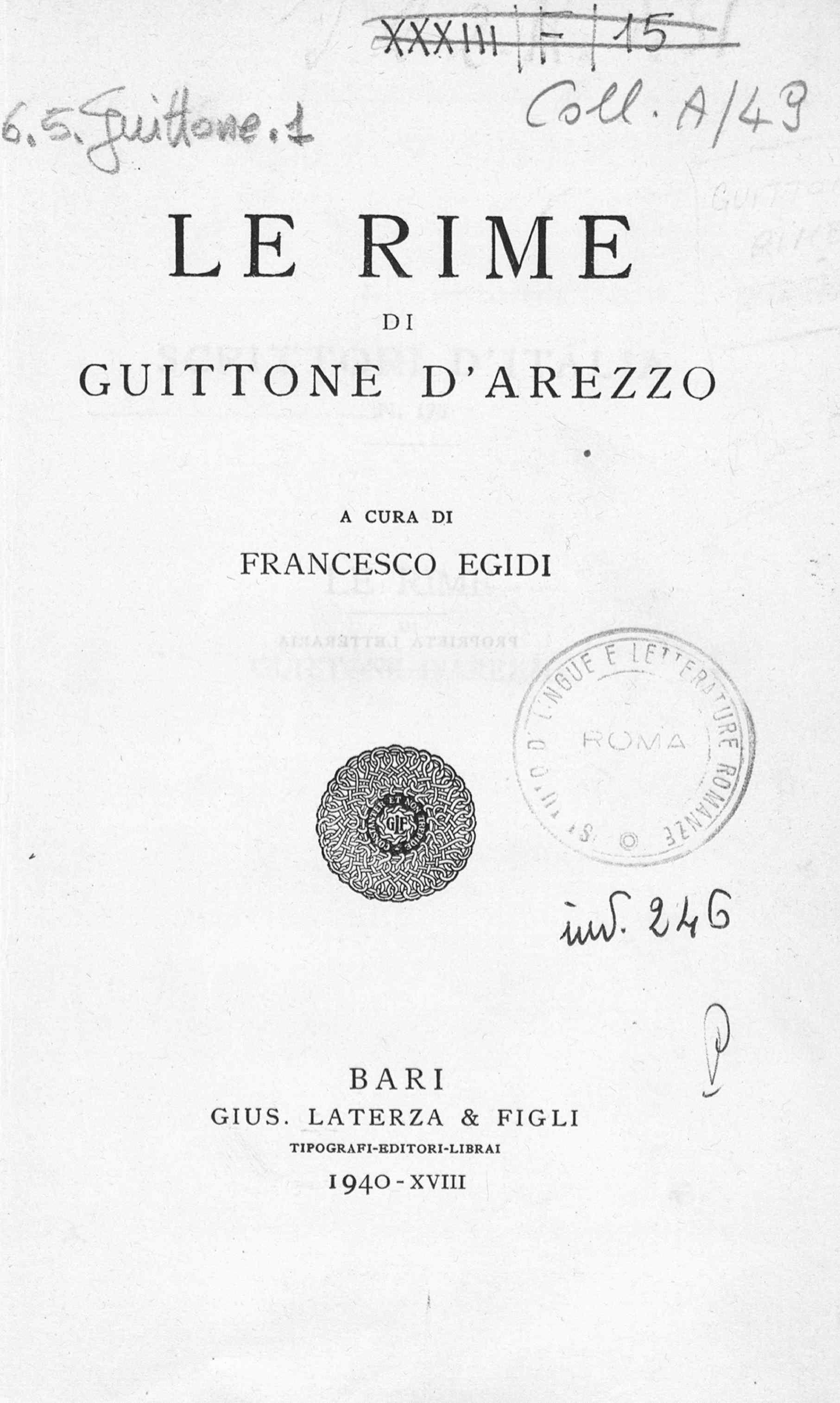 Le Rime / di Guittone d'Arezzo ; a cura di Francesco Egidi. - Bari : Laterza, 1940. - 413 p. ; 22 cm. - (Scrittori d'Italia ; 175) . Frontespizio